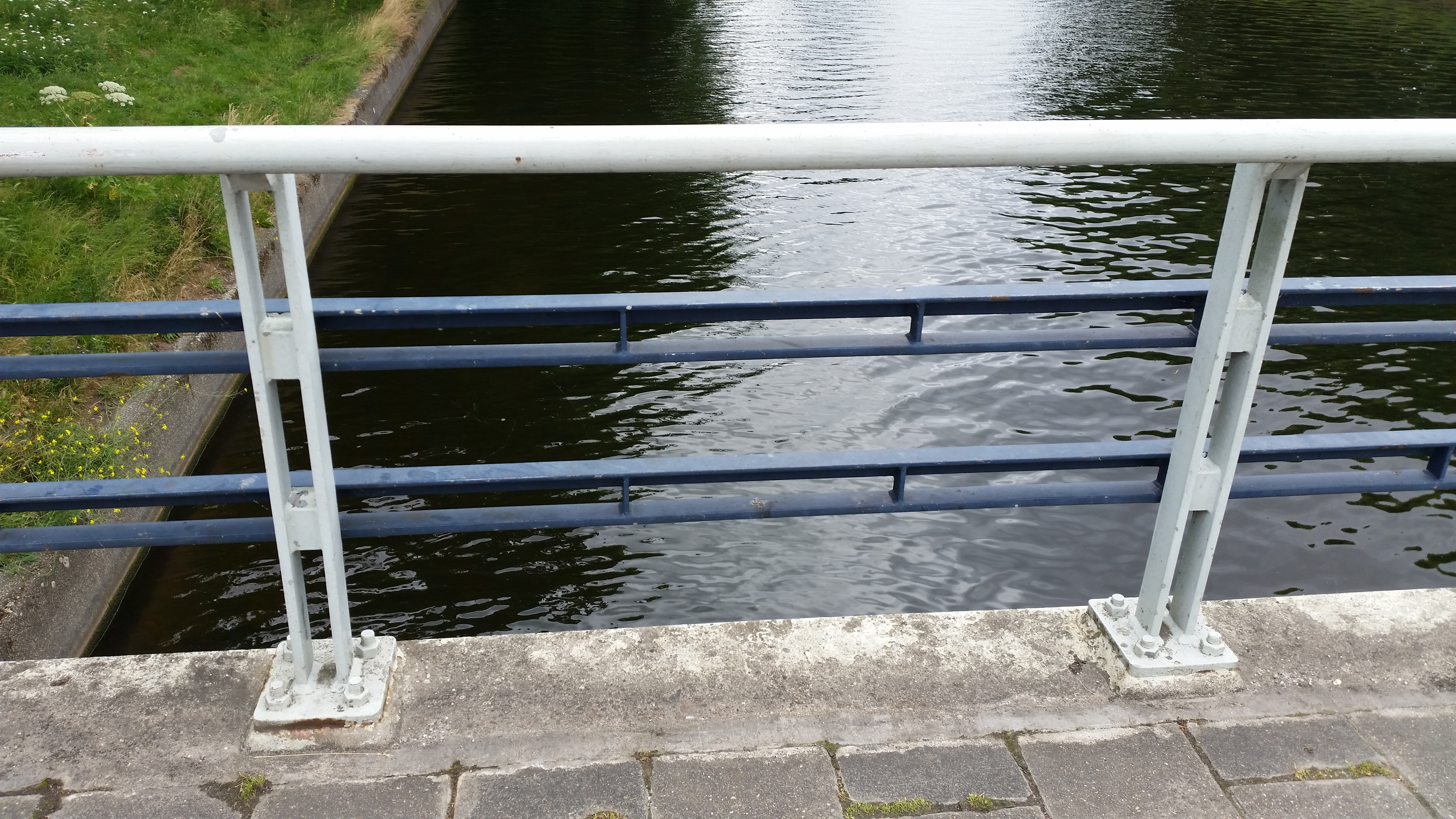 Brug 753 (in Amsterdam), typische leuning